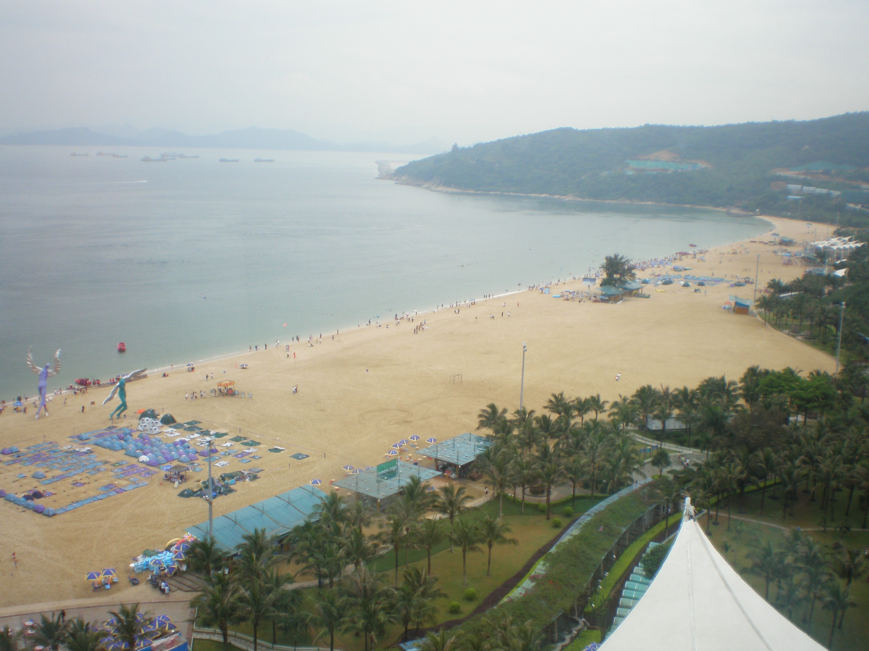 中文（中国大陆）: 大梅沙愿望塔鸟瞰沙滩